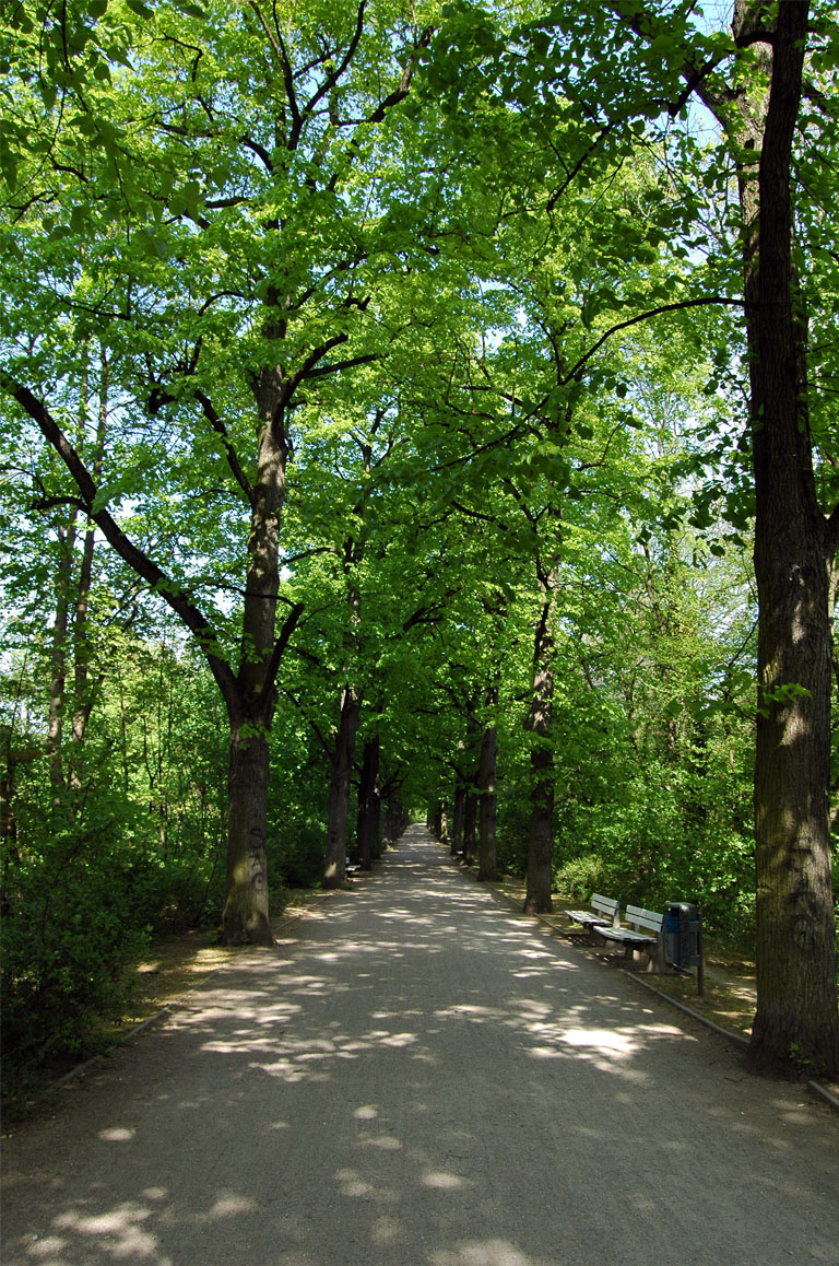 Luisenpark aus Südwesten, entlang des Flutgrabens in Erfurt